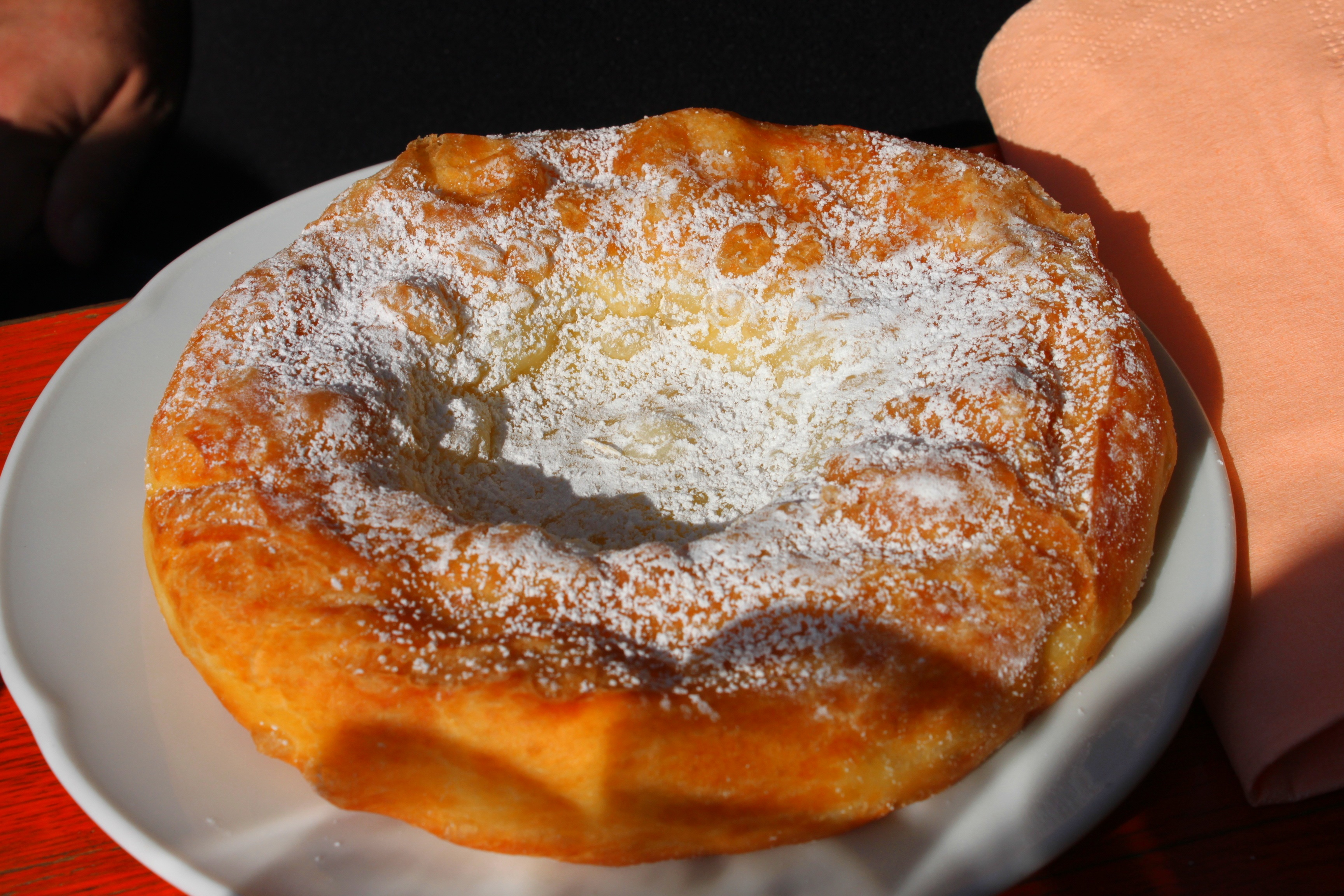 Küchla wird in Franken ein süßes, in Fett ausgebackenes Hefeteiggebäck bezeichnet, das oft an Festen frisch zubereitet wird